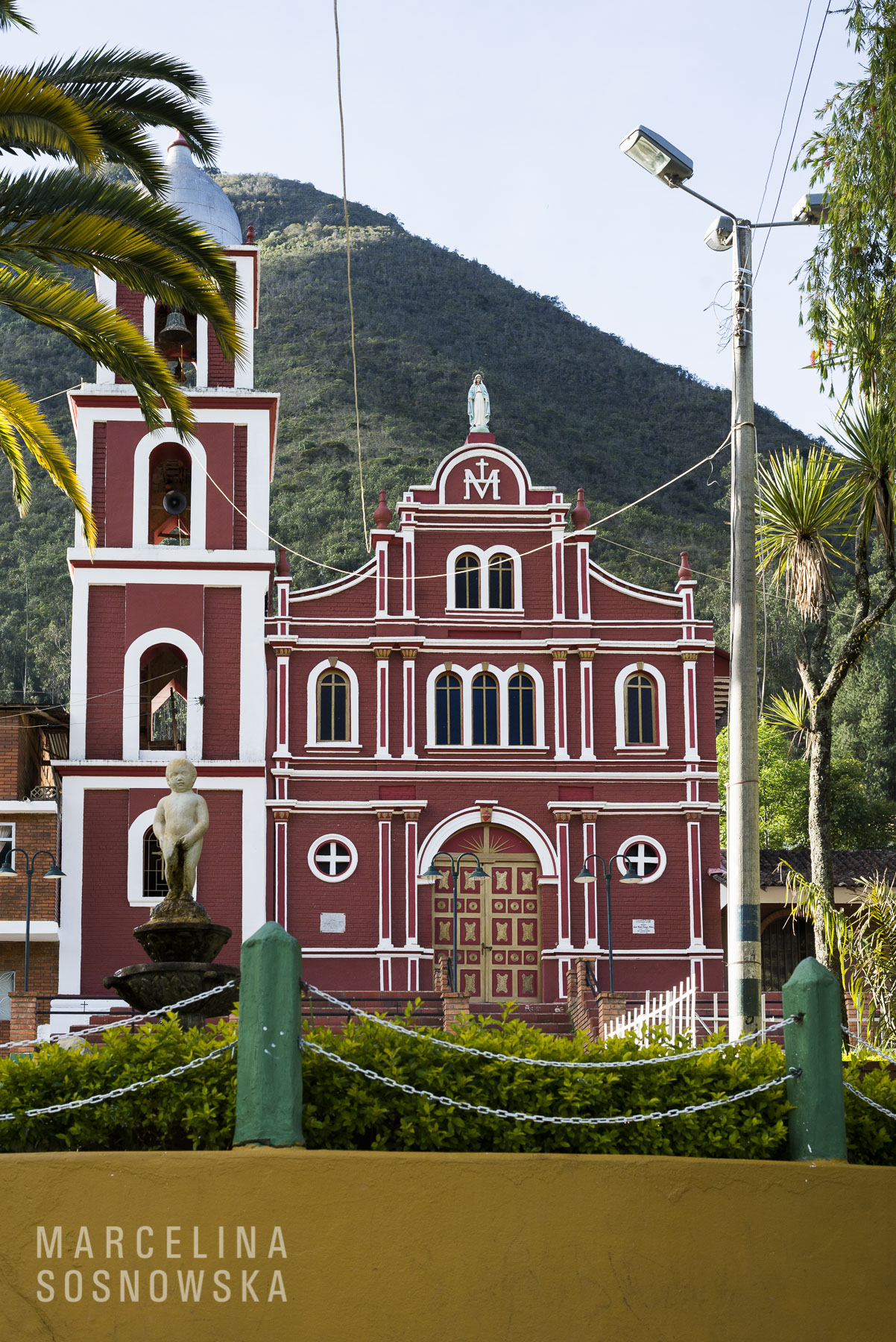 Vista frontal de la iglesia de Palermo